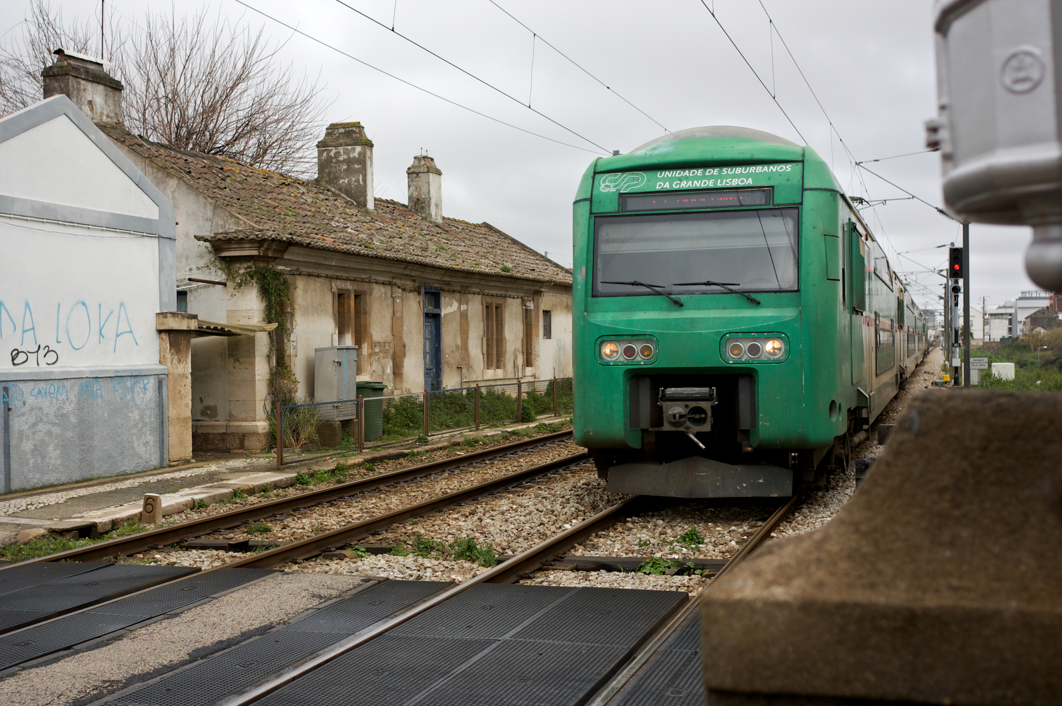 Tipo: Comboio Urbano 16536 [Castanheira do Ribatejo - Alcântara • Terra] Local: Marvila (Lisboa) [Linha do Norte, PK 3] Data e hora: 3 de Março de 2010 [16h19] Material: Automotora 35xx [Unidade Quádrupla Eléctrica]